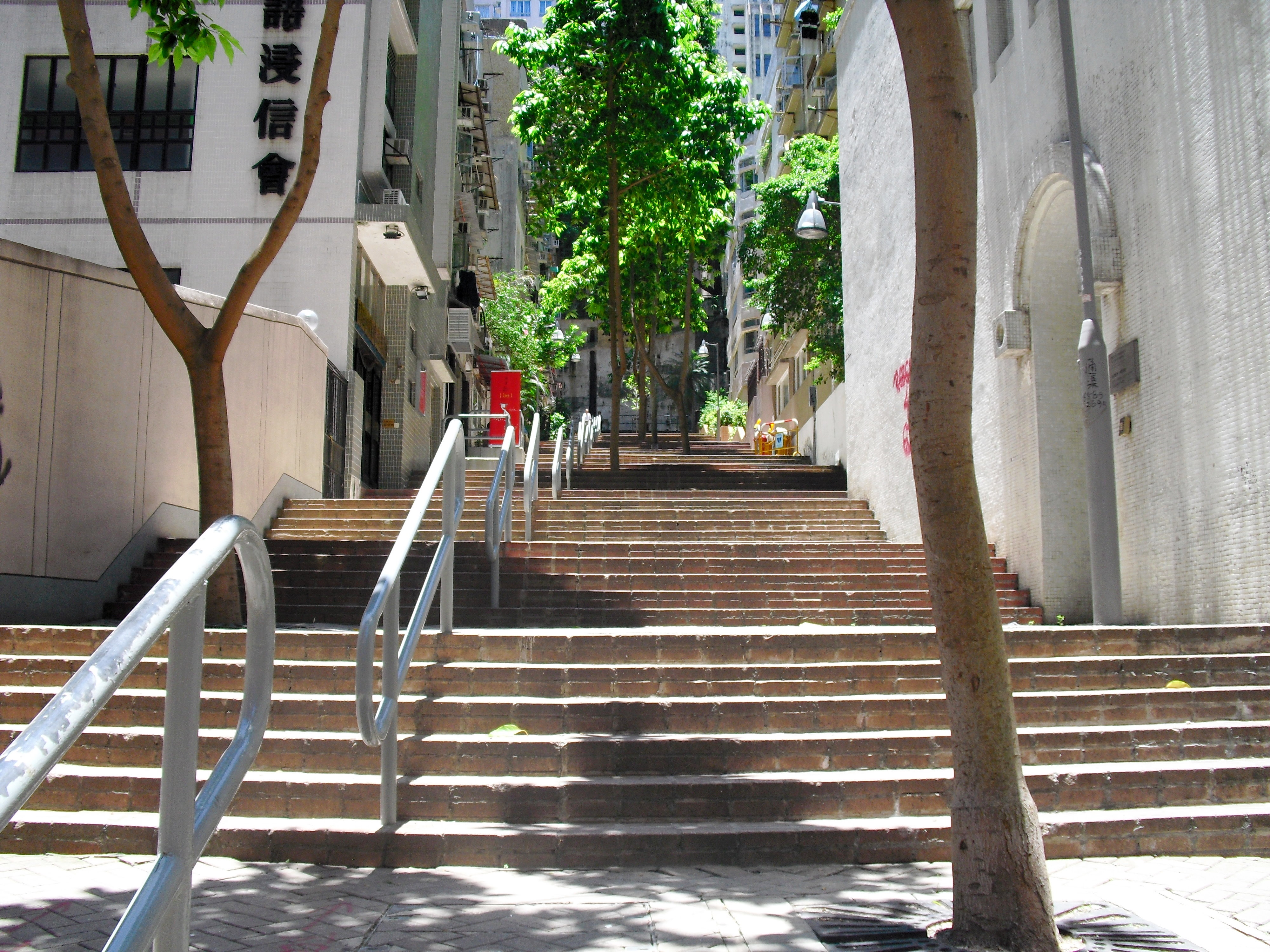 李寶龍路的景觀